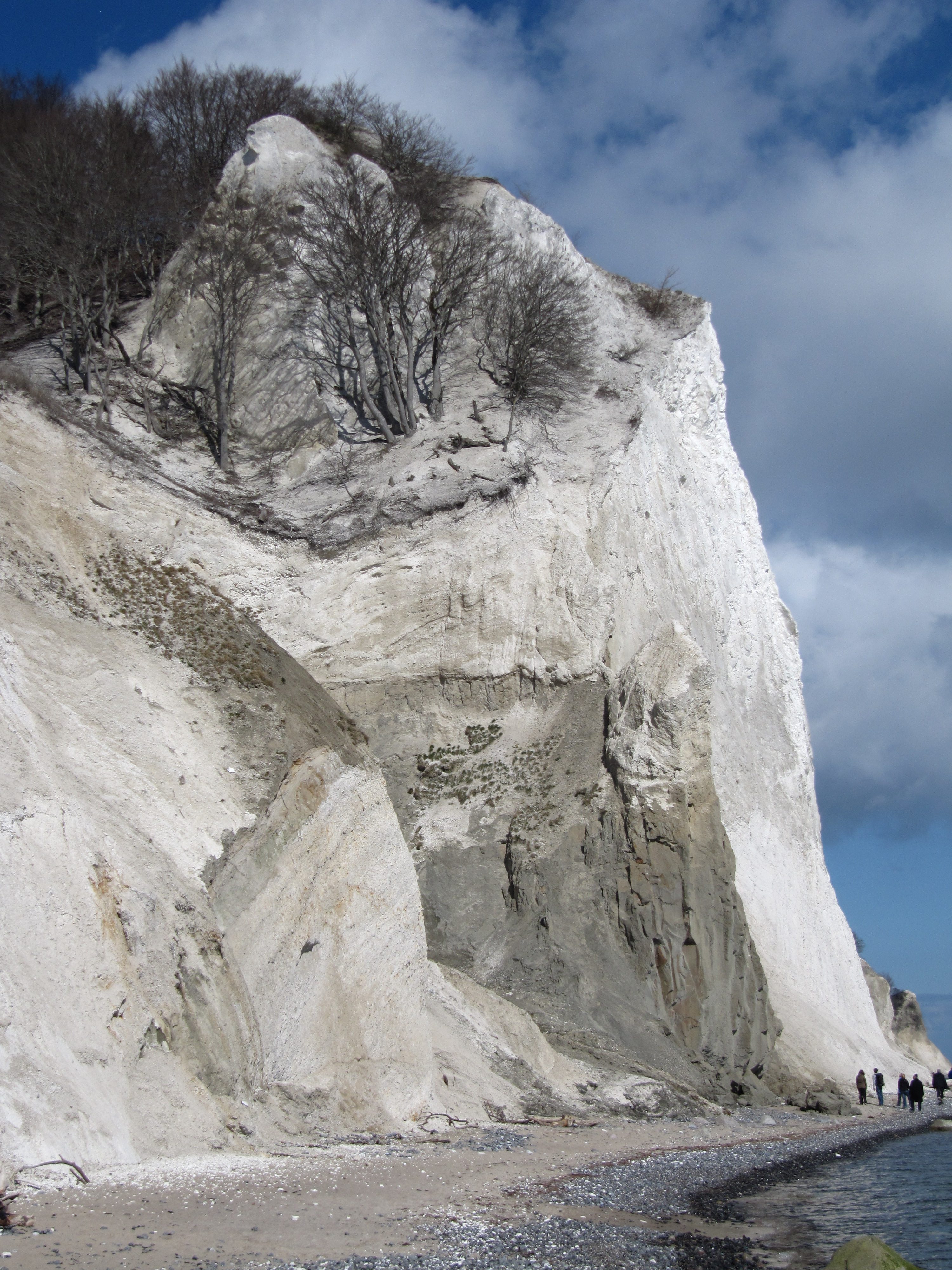 Parti fra den sydlige del af Møns Klint